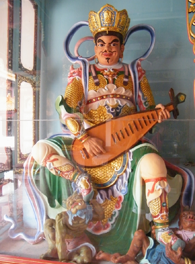 汕头 达濠 青云禅寺 东方持国天王像